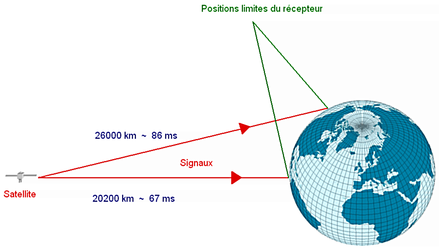 Amélioration de l'image Image:Temps de parcours GPS.JPG